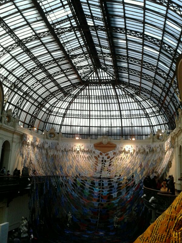 exposisión de arte con ropa usada, museo bellas artes